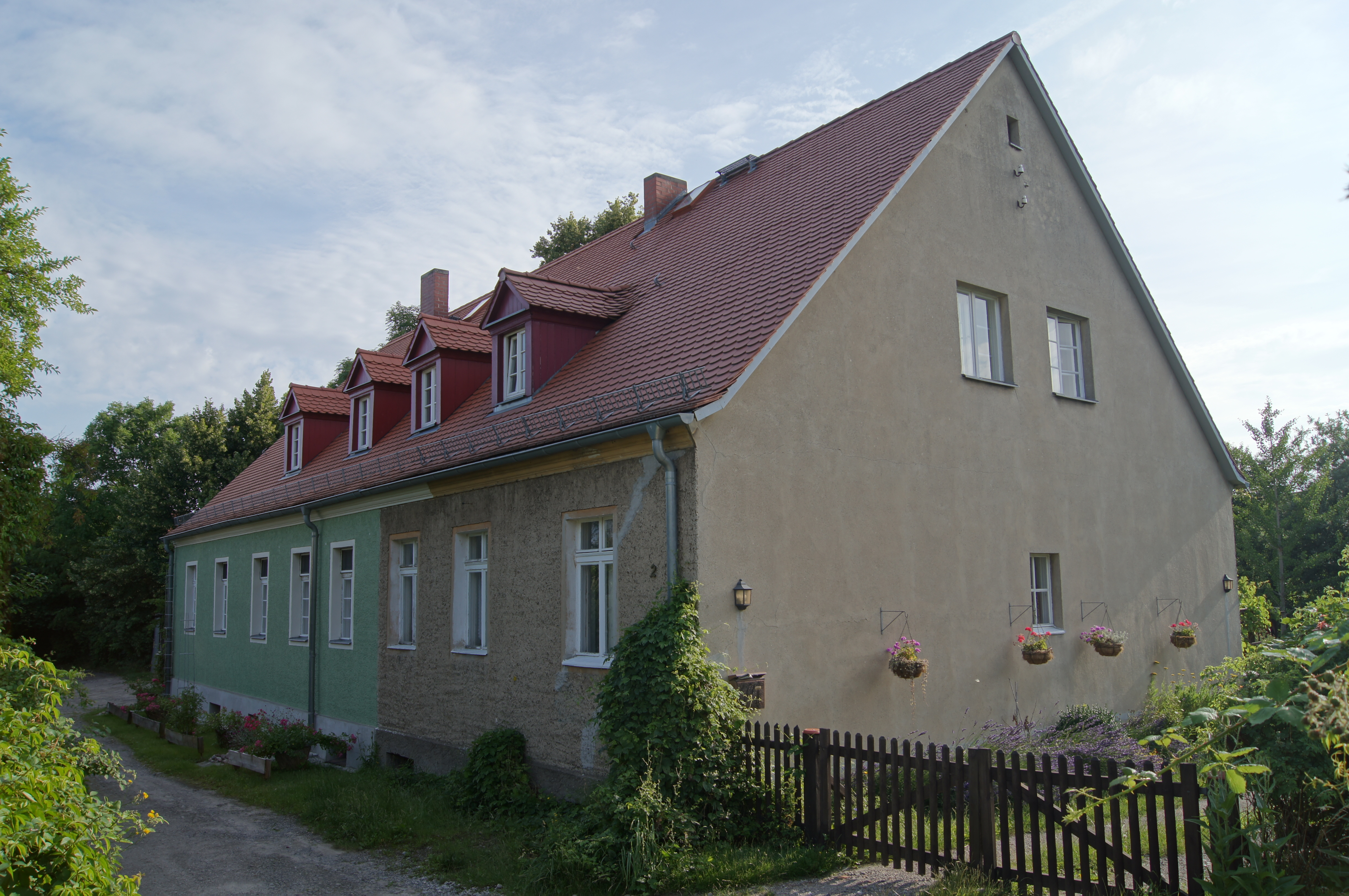 Wohnsiedlung Paulinenhof, Frankfurt (Oder)